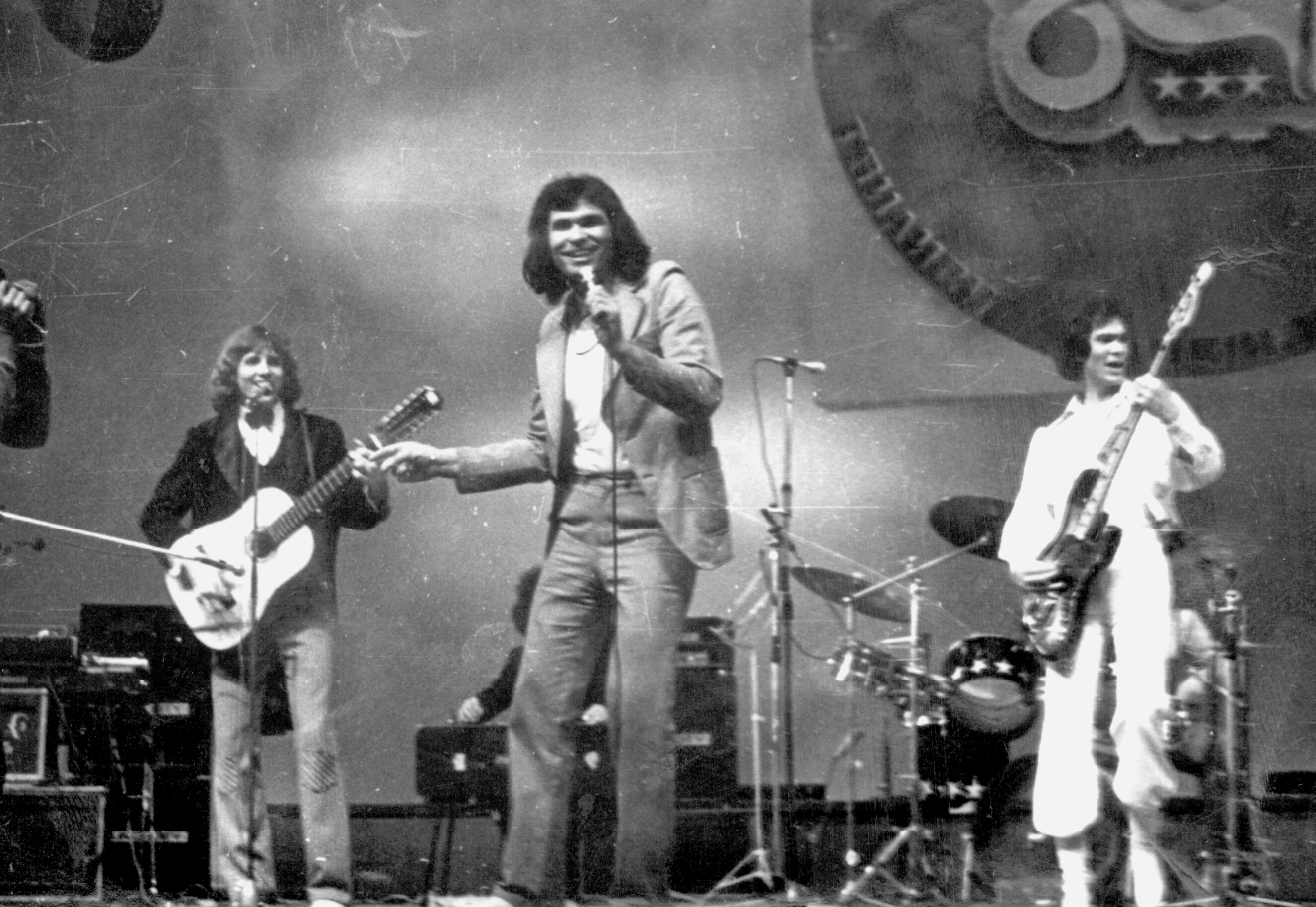 фотографии и афиши группы "Интеграл"